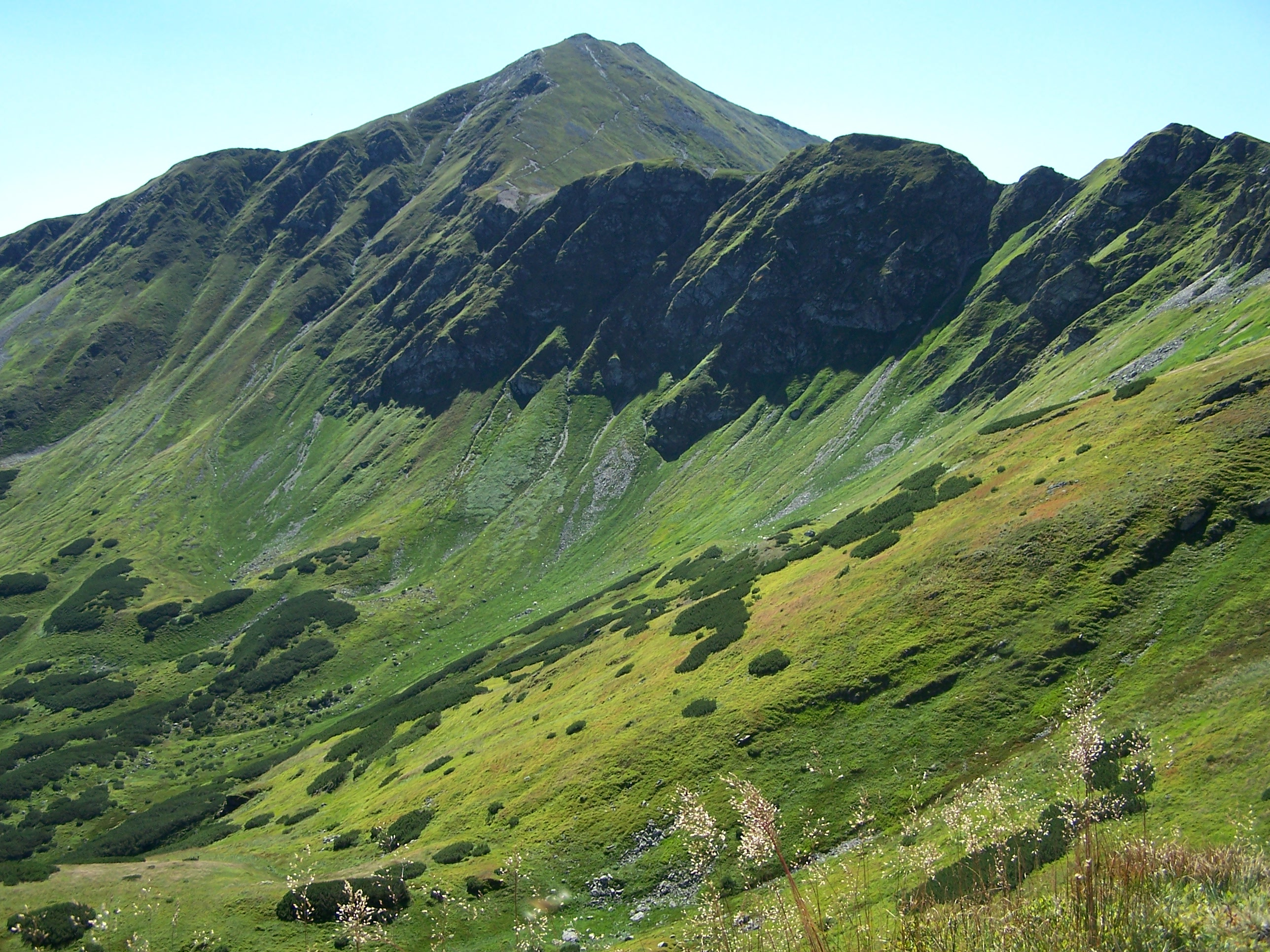 Błyszcz, Liliowe Turnie i górna część Doliny Pyszniańskiej